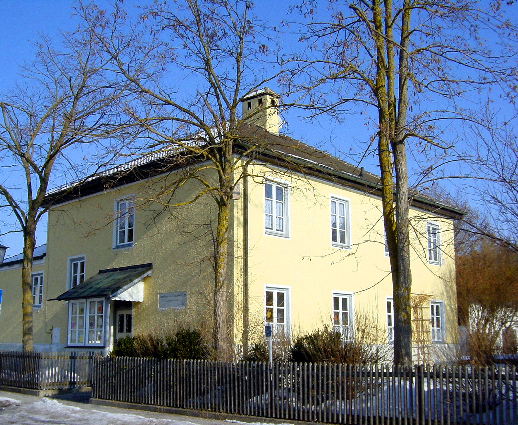 Starnberg, OT Perchting. Ehemalige Volksschule der Schüler aus den Dörfern Hadorf, Landstetten und Perchting. Die Räume im Erdgeschoss werden heute als Kindergarten genutzt.